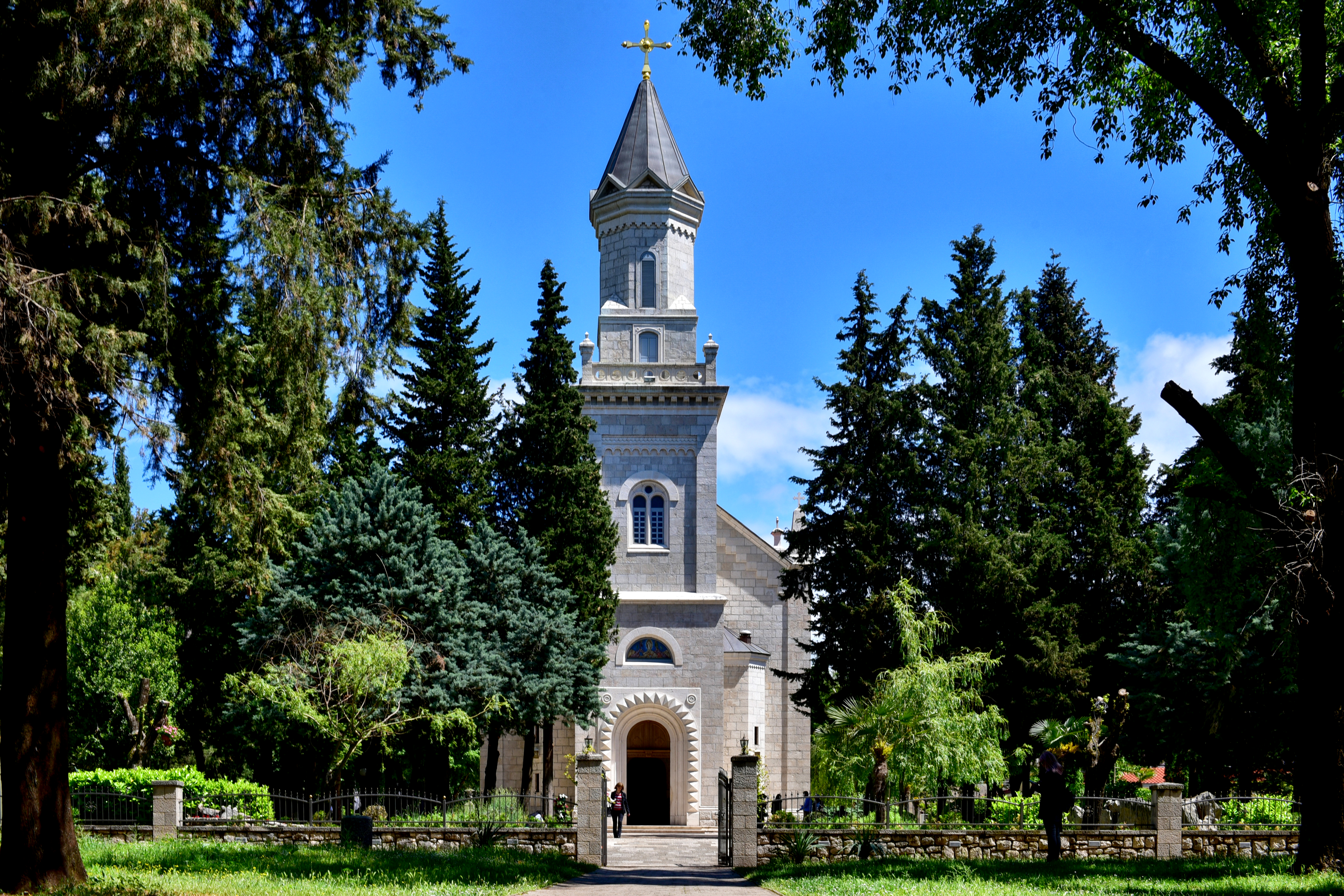 Црква Преображења Господњег, Требиње ID добра: NKD657